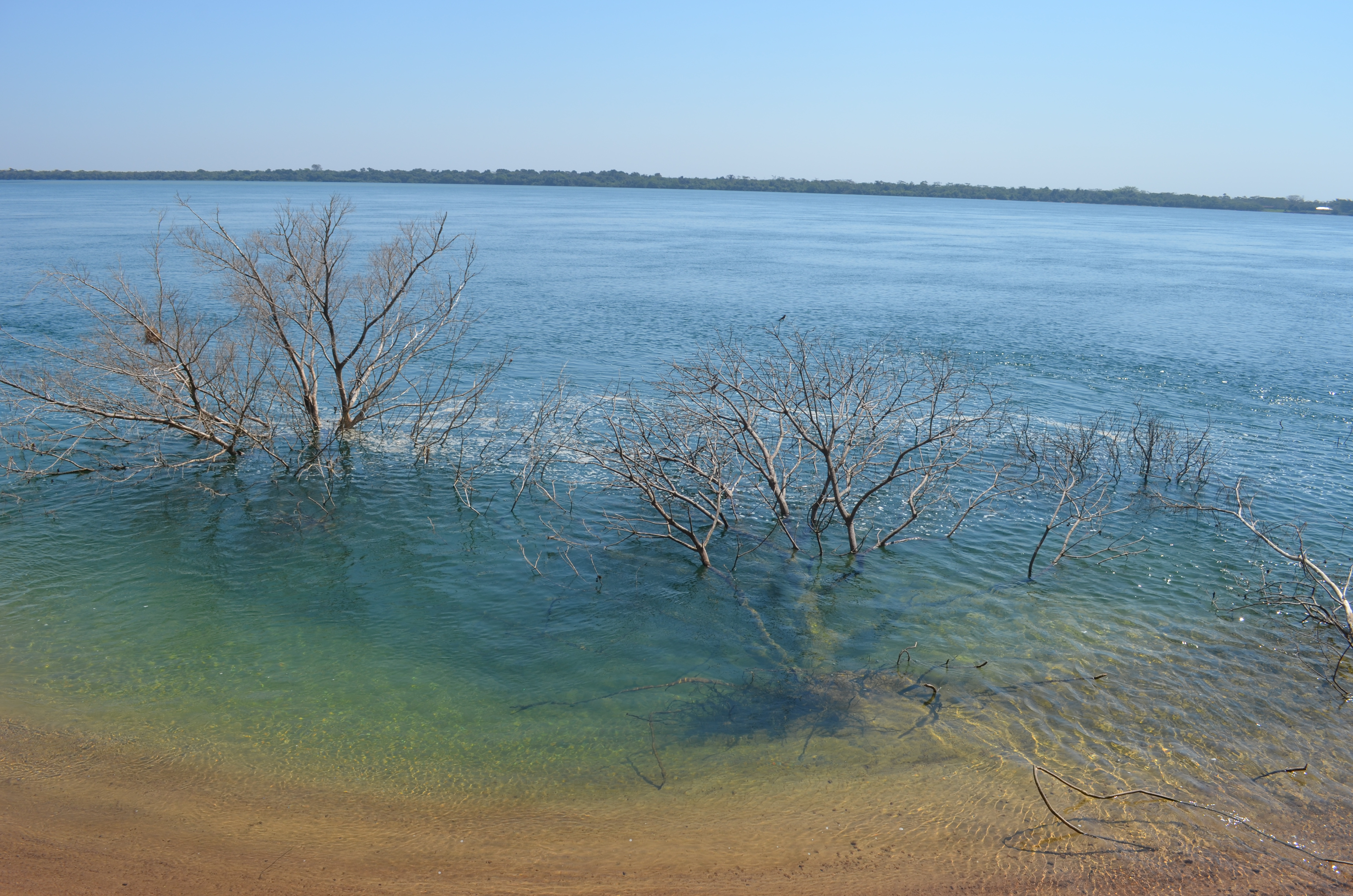 Área de Proteção Ambiental das Ilhas e Várzeas do Rio Paraná de nível Federal, localizado (a) em Mato Grosso do Sul, Paraná e São Paulo